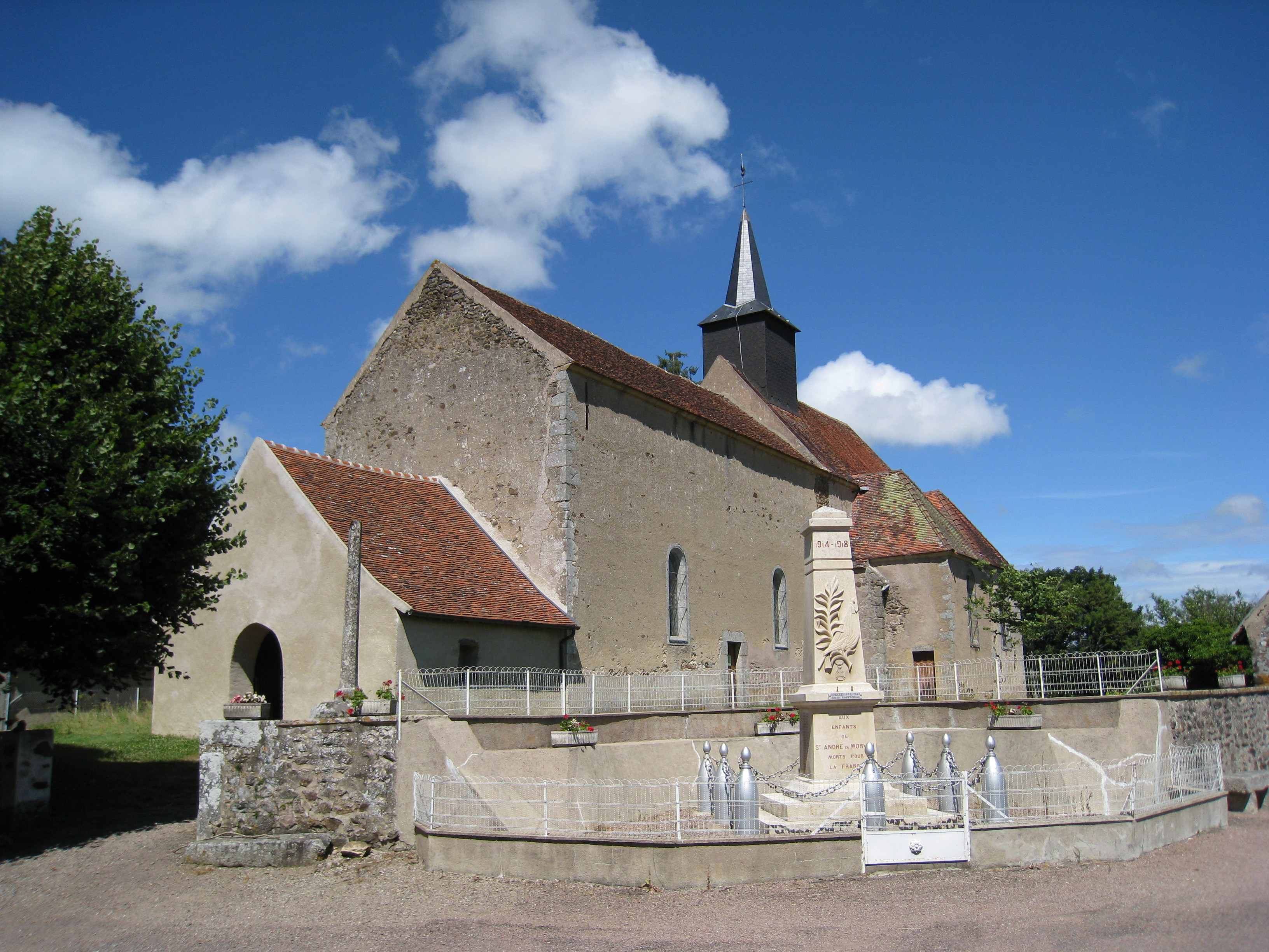 Église de Saint-André-en-Morvan, avec son monument aux morts 1914-1918.